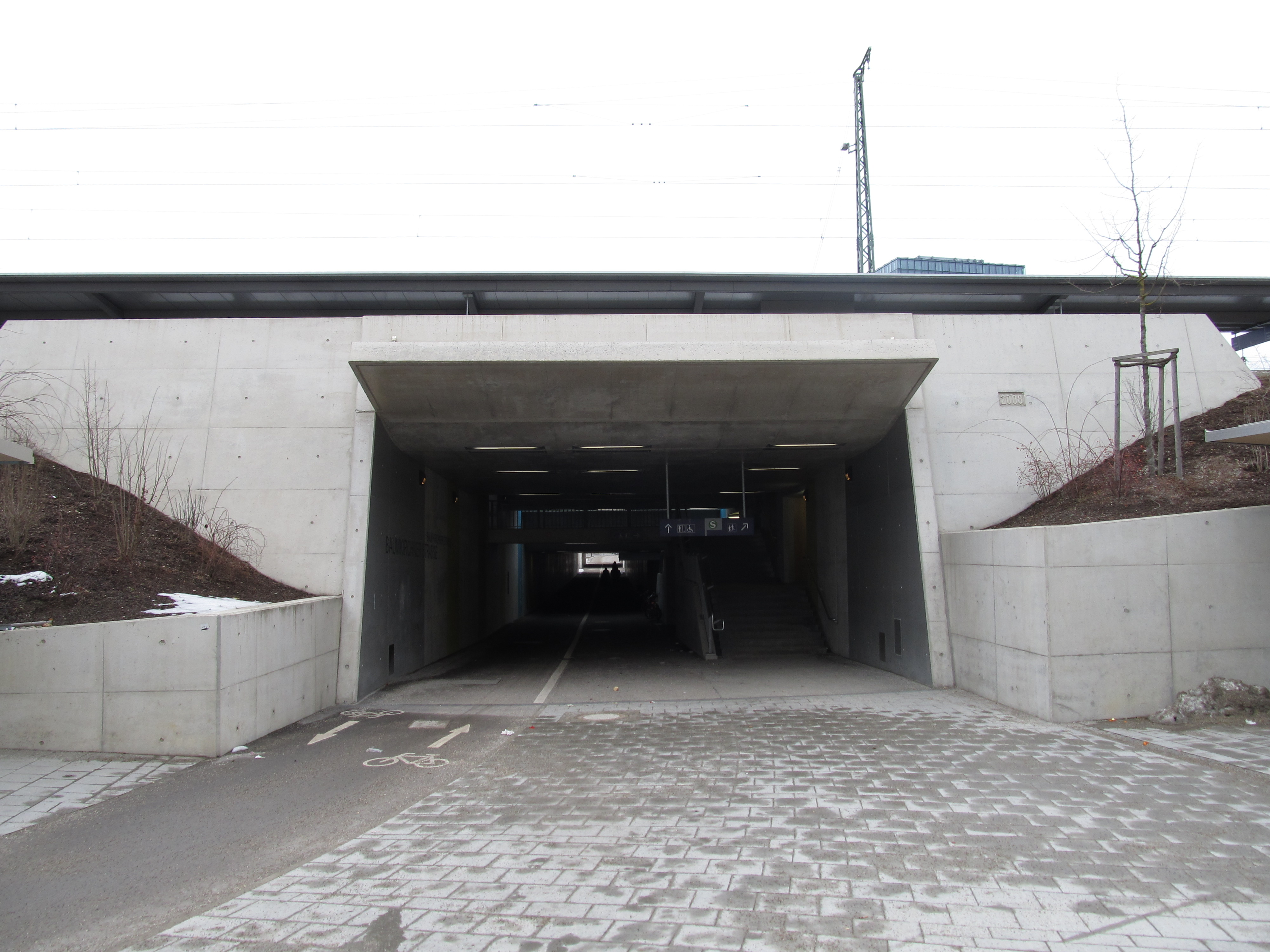 Unterführung des Bahnhofes Berg am Laim